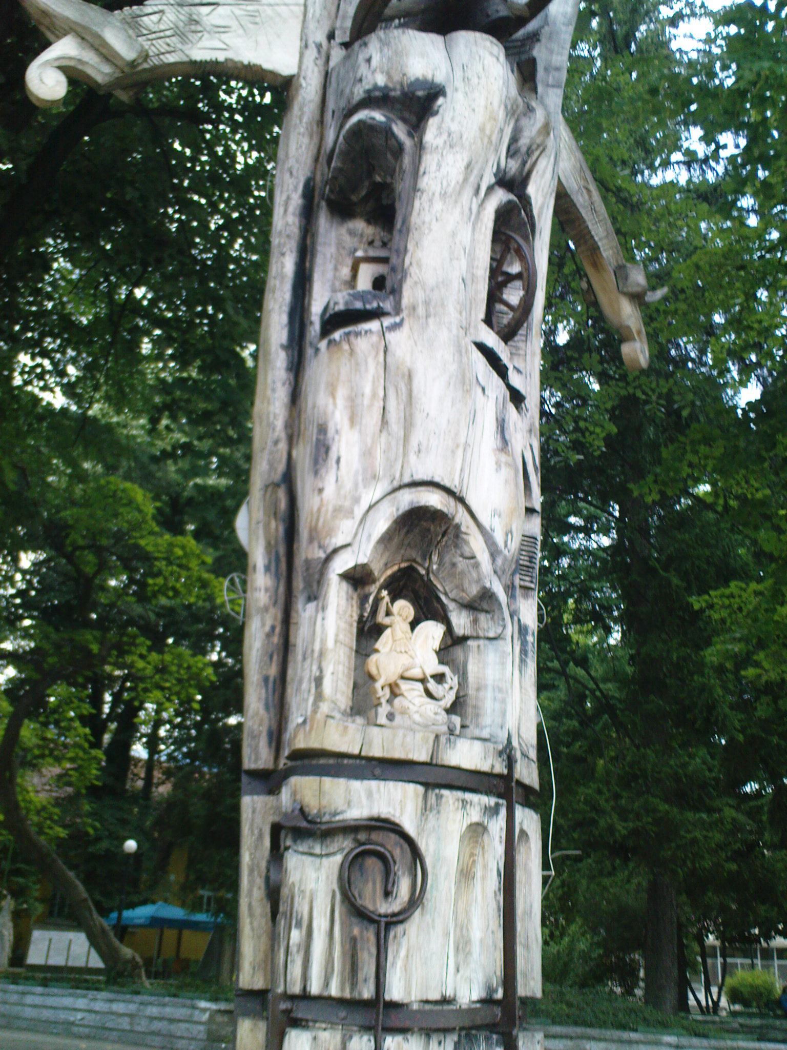 Берковица: паметник „Дърво на живота“ на писателя Йордан Радичков с образи от неговите произведения